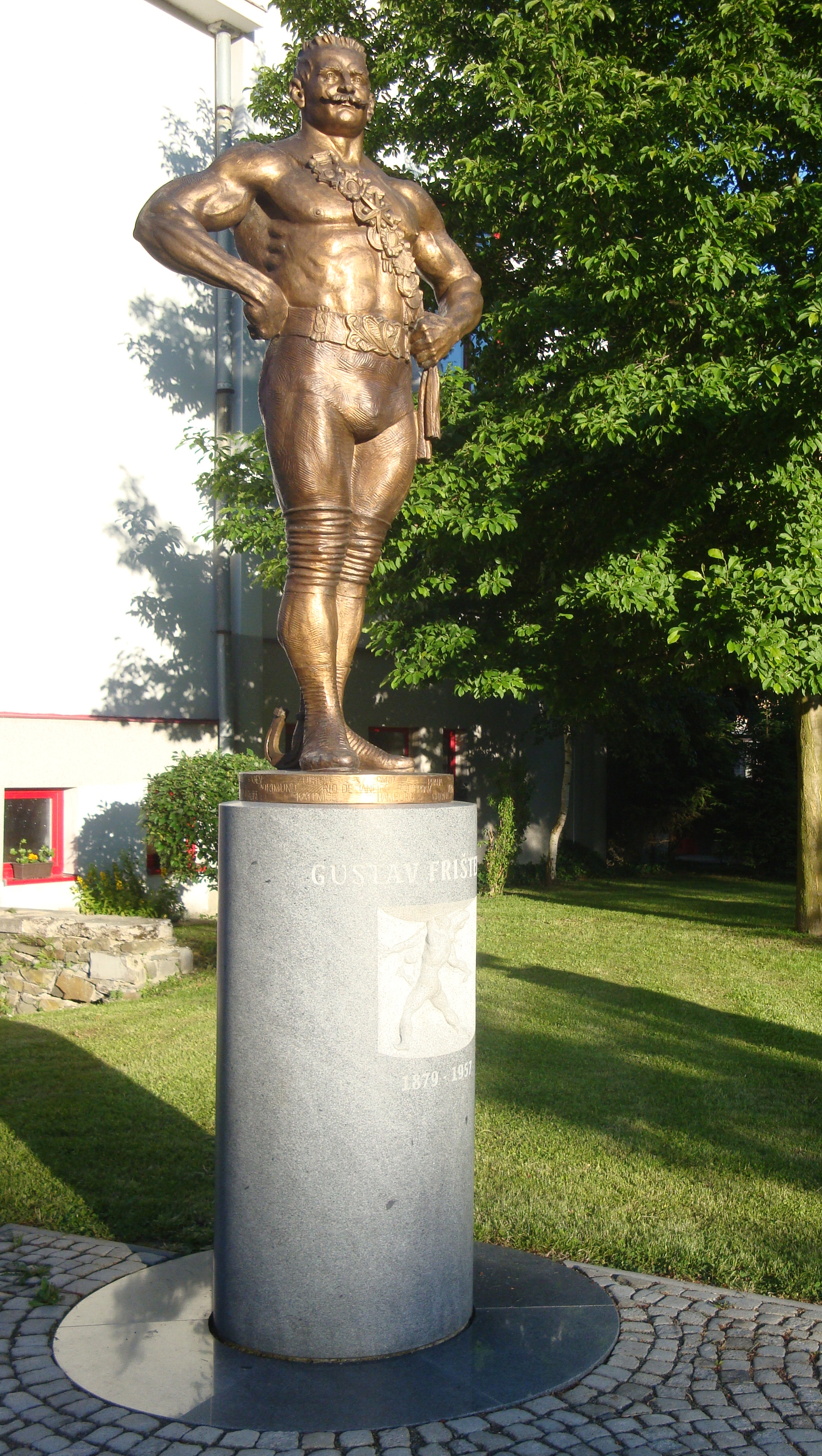 Pomník Gustava Frištenského, Litovel